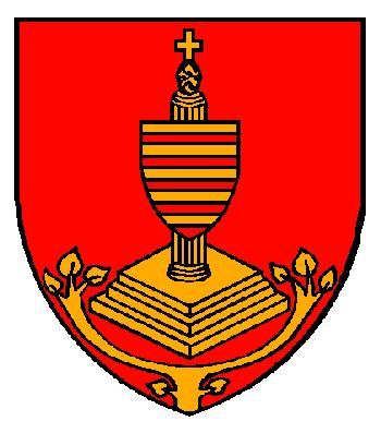 Wapen van de stad Dilsen-Stokkem